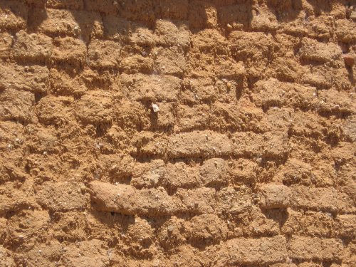 Au nord-ouest de l'Espagne (Castille Leon et Galice) il existe un patrimoine important de maisons et bâtiments publics - églises, etc. - en adobe. Ce patrimoine est le plus couramment en situation de décrépitude. Exemple typique de mur d'adobe ayant perdu son enduit de torchis.